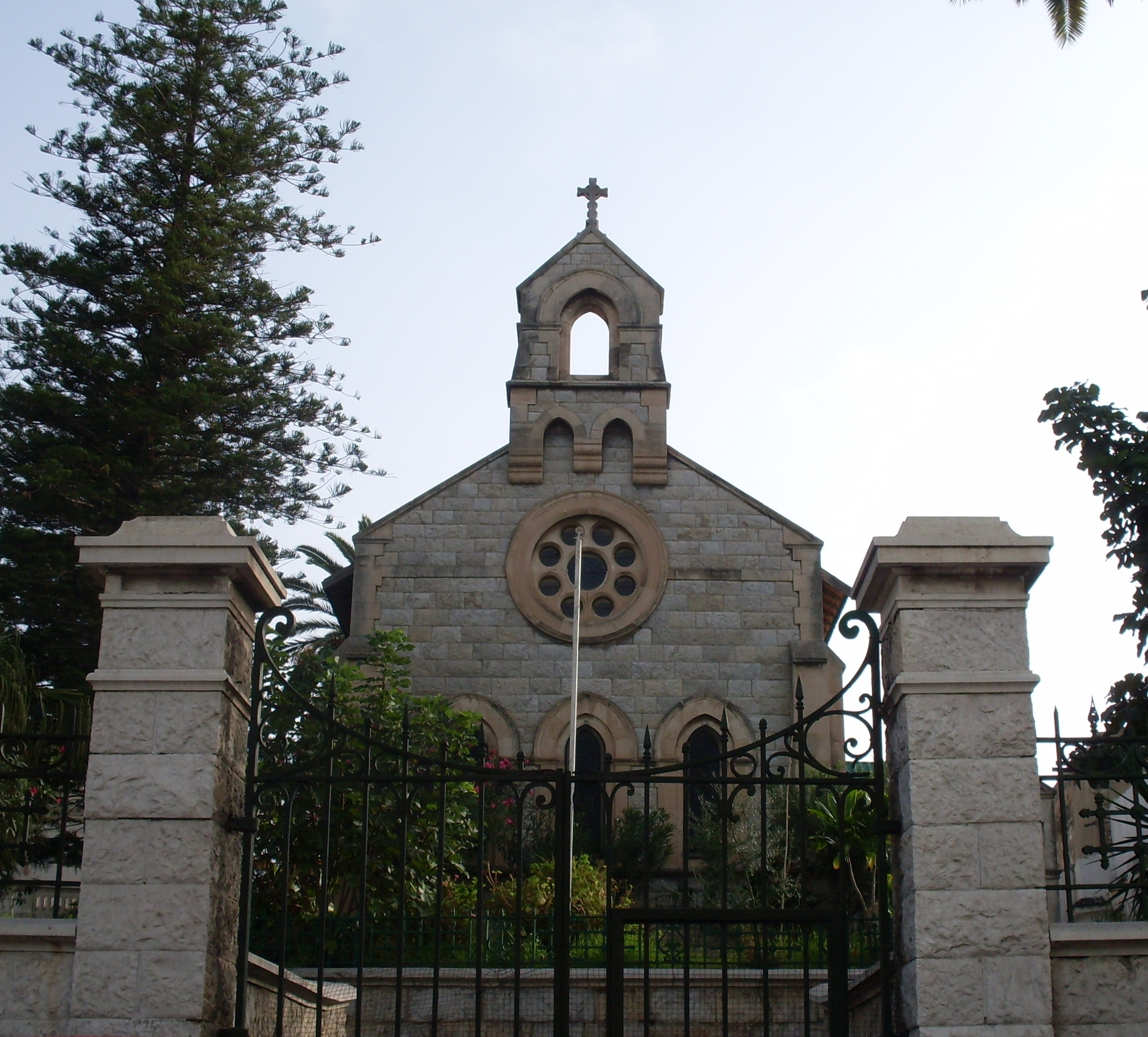 Eglise Anglicane Saint George, place Bab Carthagène.